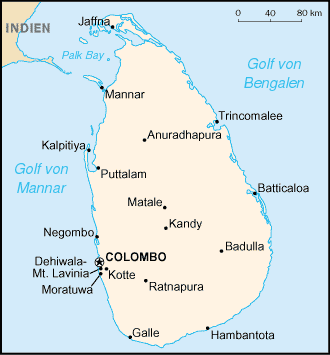 Karte von Sri Lanka – CIA World Factbook